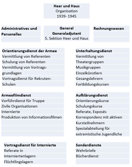 Heer und Haus, Organisation 1939-1945, Armee Schweiz, Quelle: Treumund E. Itin: Heer und Haus und die geistige Landesverteidigung. Schweizer Soldat 12/1997